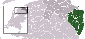 East-Groningen